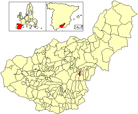 Situación del término municipal de Alquife respecto a la provincia de Granada, en España.